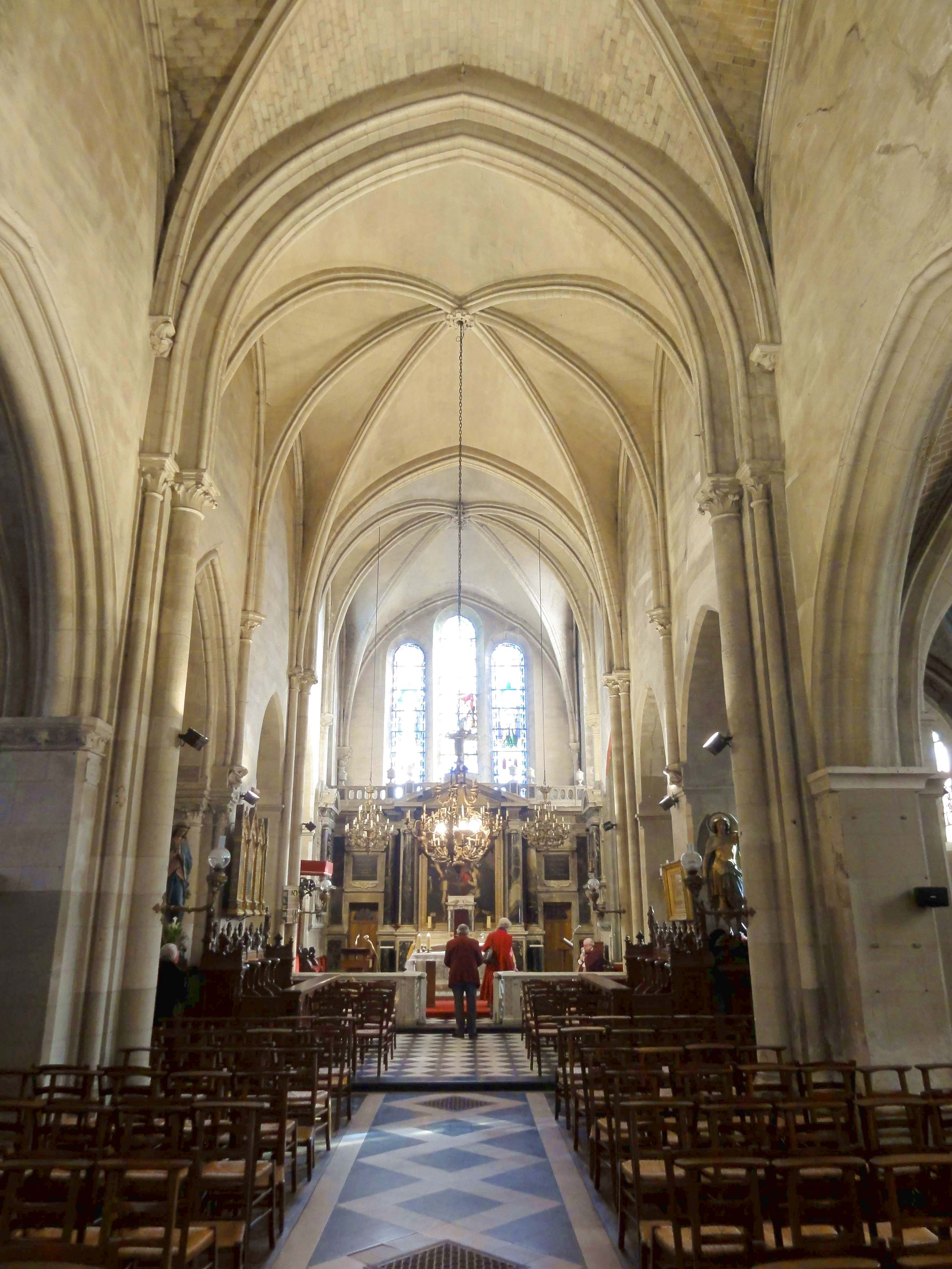 Voir titre.